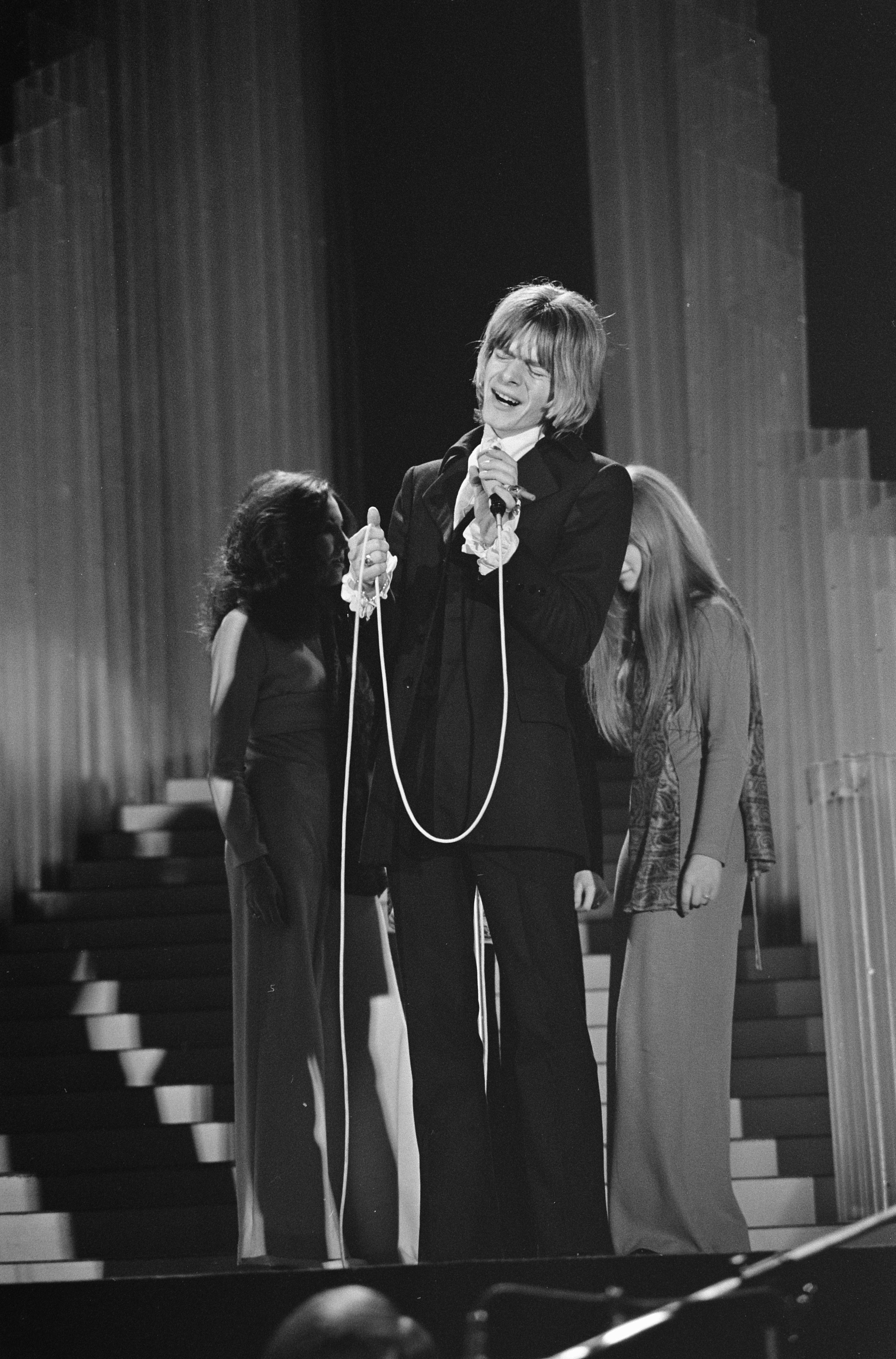 Collectie / Archief : Fotocollectie Anefo Reportage / Serie : [ onbekend ] Beschrijving : Nationale finale Eurovisie Songfestival in Nederlands Congresgebouw in Den Haag . D. C. Lewis Annotatie : pseudoniem van Ruud Eggenhuizen (Arnhem, 27 januari 1947 - aldaar, 28 april 2000) Datum : 11 februari 1970 Locatie : Den Haag, Zuid-Holland Trefwoorden : songfestivals, zangers Persoonsnaam : D.C. Lewis Instellingsnaam : Congresgebouw, Eurovisie Song Festival Fotograaf : Mieremet, Rob / Anefo Auteursrechthebbende : Nationaal Archief Materiaalsoort : Negatief (zwart/wit) Nummer archiefinventaris : bekijk toegang 2.24.01.05 Bestanddeelnummer : 923-2491